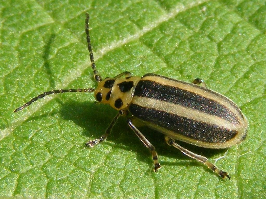 Trirhabda virgata (Chrysomèle rayée de la verge d'or)